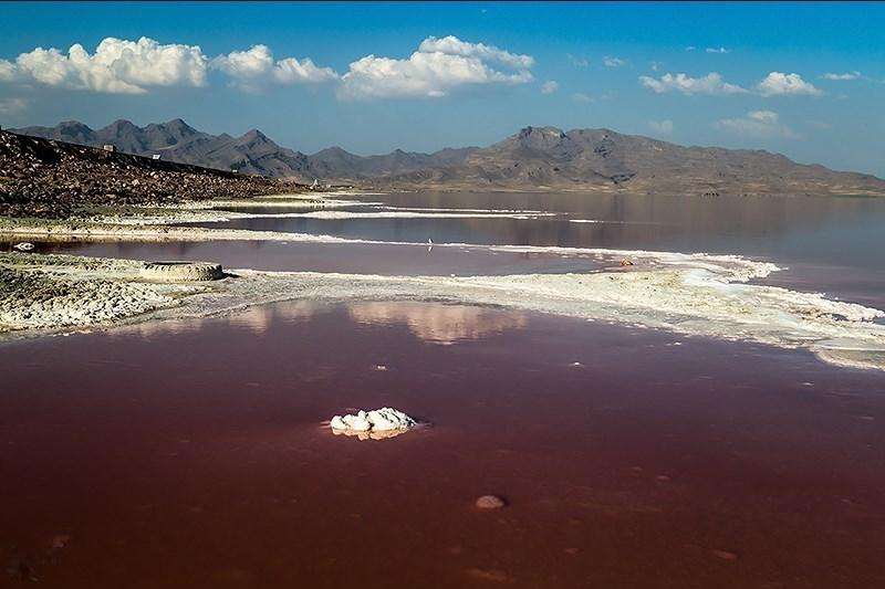 سرخی دریاچه ارومیه - تغییراتی مانند قرمز رنگ شدن دریاچه ارومیه در دریاچه های شور جهانی نظیر گریت سالت لیک آمریکا و دریاچه یوتا و بحرالمیت در اردن نیز دیده شده است.کارشناسان دلیل اصلی این تغییر رنگ را افزایش فعالیت آرتمیا و رشد جلبک در دریاچه ارومیه اعلام کرده اند. با کاهش دمای آب، شروع وزش بادهای منطقه ای و کاهش شدت و زمان نور خورشید و افزایش آب های ورودی ، این وضعیت به تدریج از بین خواهد رفت.